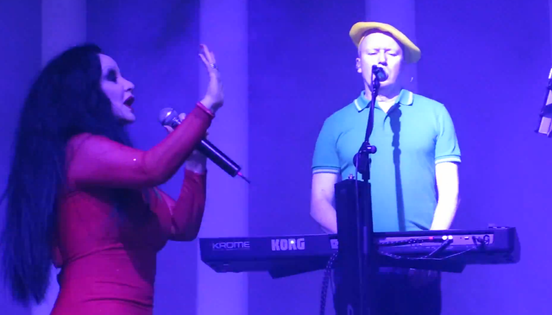 Fangoria (Alaska y Nacho Canut) en una actuación de la gira Música, Gogós y Policromía